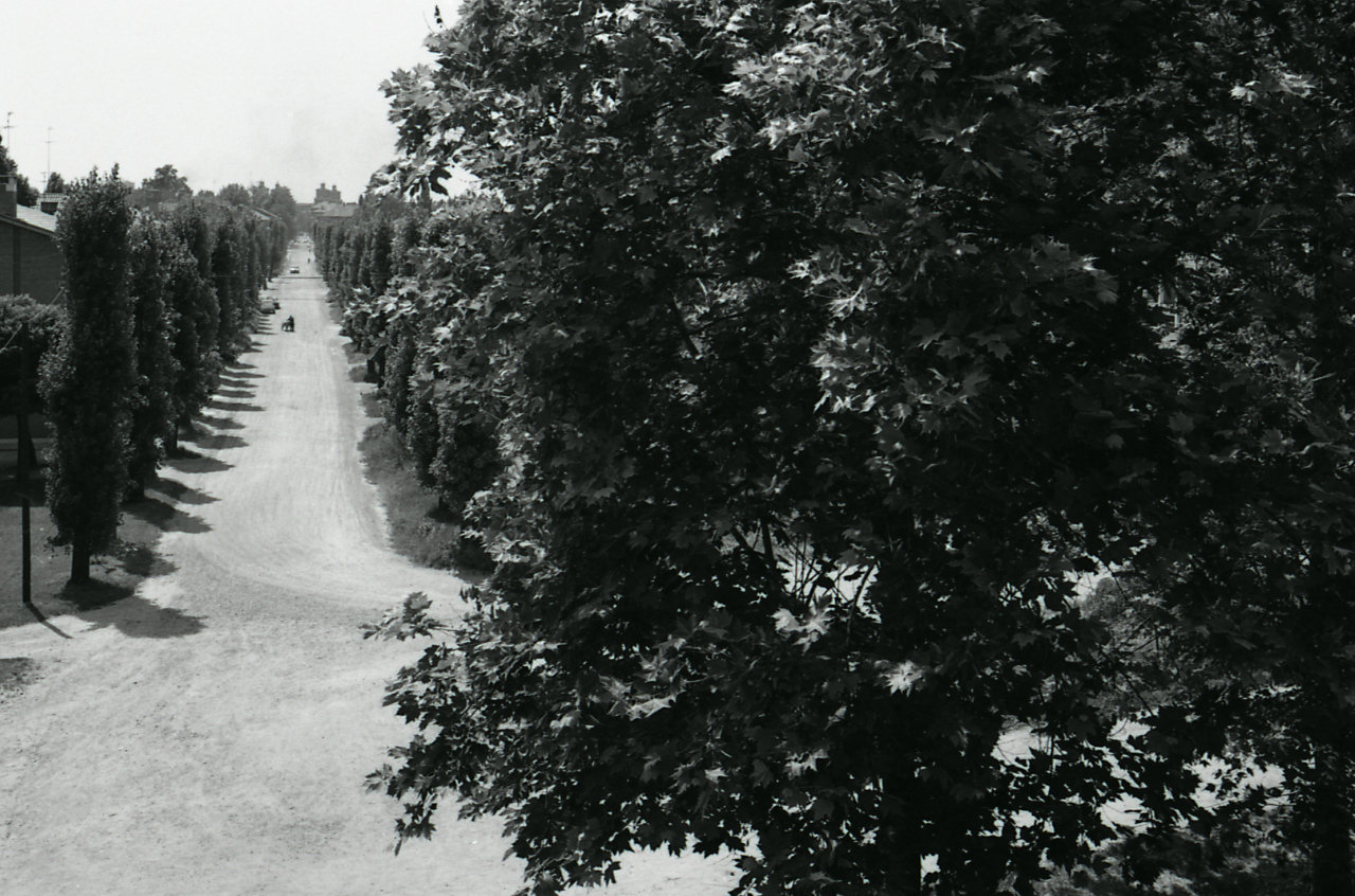 Servizio fotografico : Ferrara, 1974 / Paolo Monti. - Strisce: 1, Fotogrammi complessivi: 6 : Negativo b/n, gelatina bromuro d'argento/ pellicola ; 35 mm. - ((Sul portanegativi: N[I]K[MA]T PanF. - Occasione: Campagna di rilevamento del centro storico. - Fonte: Agenda di Paolo Monti: Leica 1501-3000 Controllo numerazione (1950-1978), presso Archivio Paolo Monti